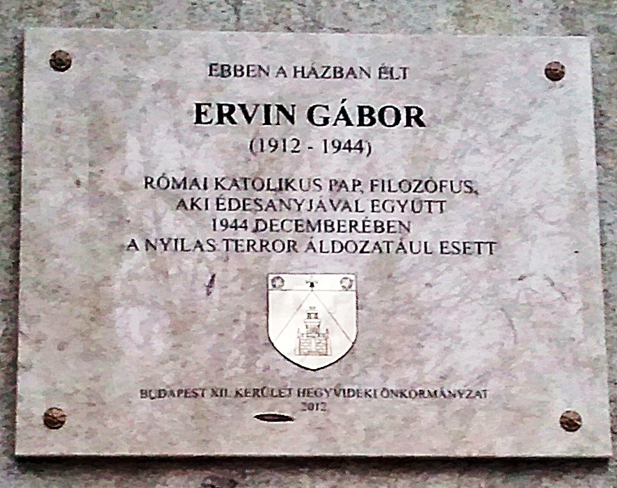 Ervin Gábor emléktábla. Budapest XII. kerület Maros utca 44B